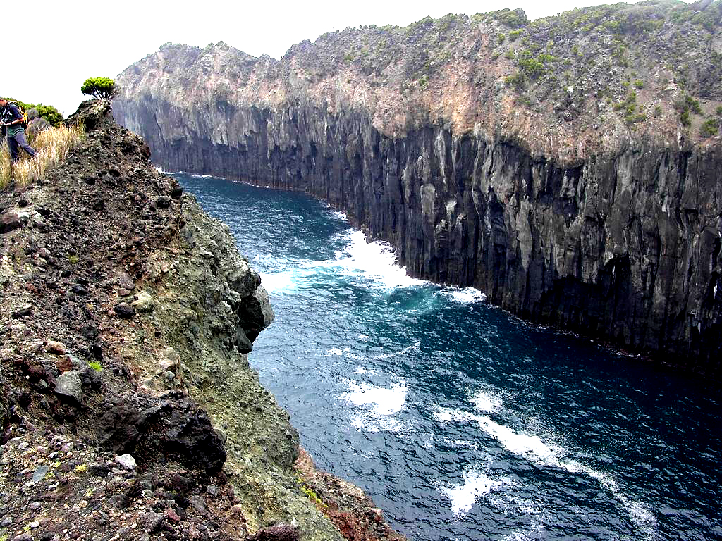 Costa das Quatro Ribeiras, formação rochosa, Praia da Vitória, ilha Terceira, Açores